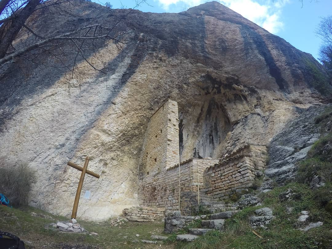 Grotte di Soffiano presso Sarnano (MC)